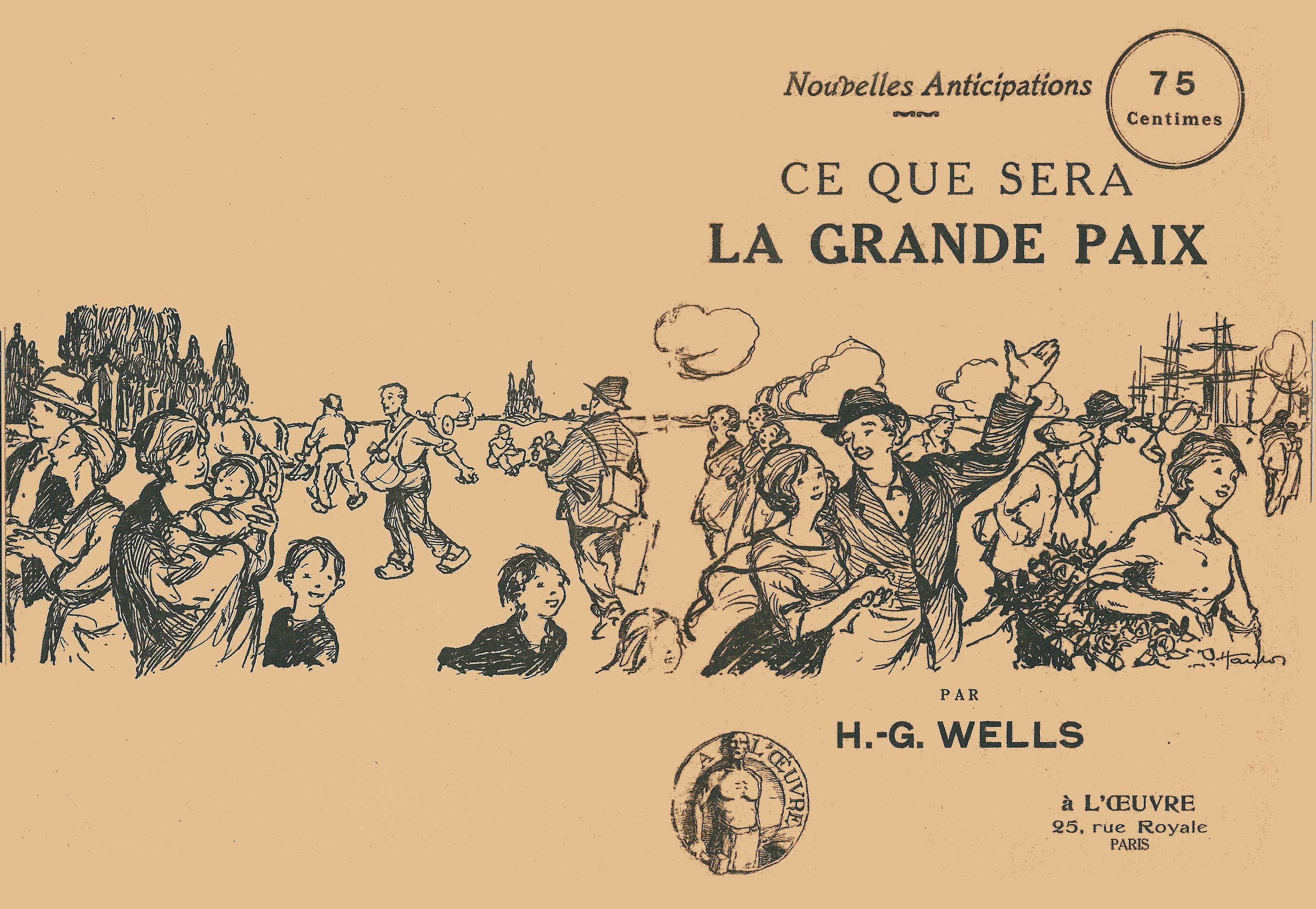 Couverture (1 & 4) de Ce que sera La Grande Paix, par H. G. Wells ; édition A l'Oeuvre, 1918 .